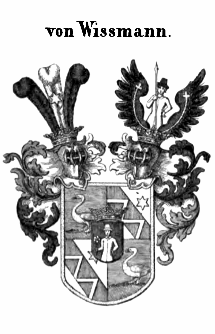 Wappen derer von Wissman (Wißmann)